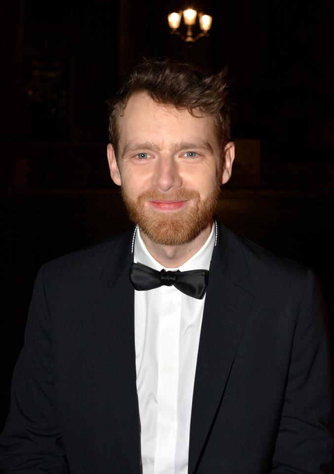 Antoine Reinartz au dîner des révélations des César du cinéma